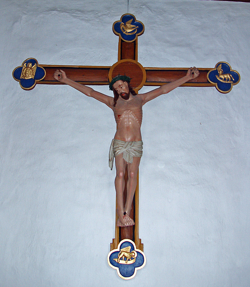 Krucifiks da: Gylling Kirke, Hads Herred, Århus Amt , Danmark